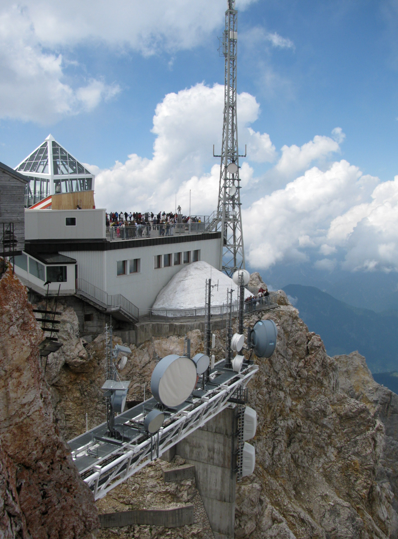 Meteorologische Station auf der Zugspitze